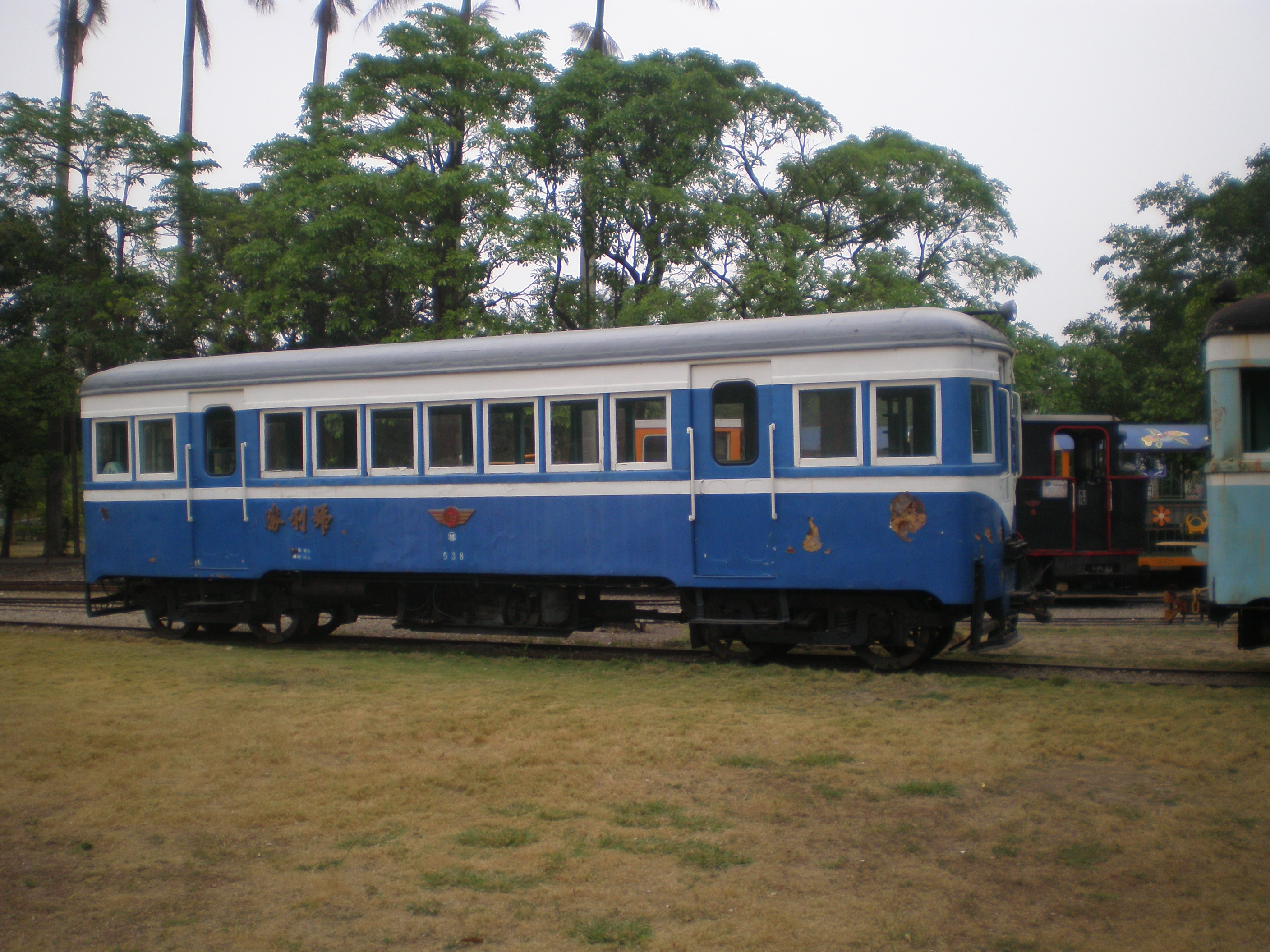 在烏樹林糖廠靜態展示的勝利號客車